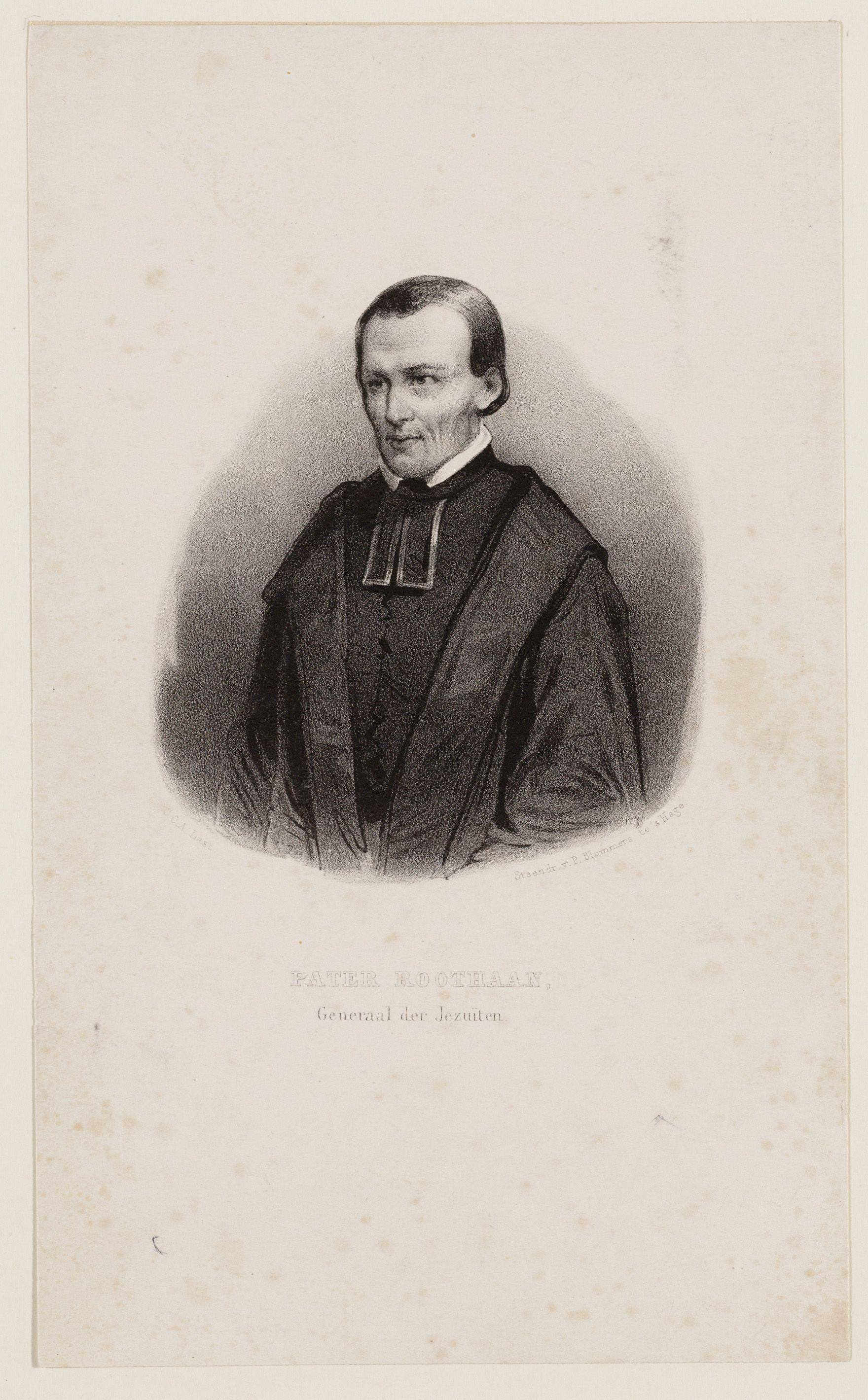 Beschrijving Joannes Philippus Roothaan (1785-1853) Generaal der Jezuïeten-orde Documenttype prent Vervaardiger Last, Carel Christiaan Antony Blommers, P. Collectie Collectie Atlas Dreesmann Inventarissen Afbeeldingsbestand 010094007755